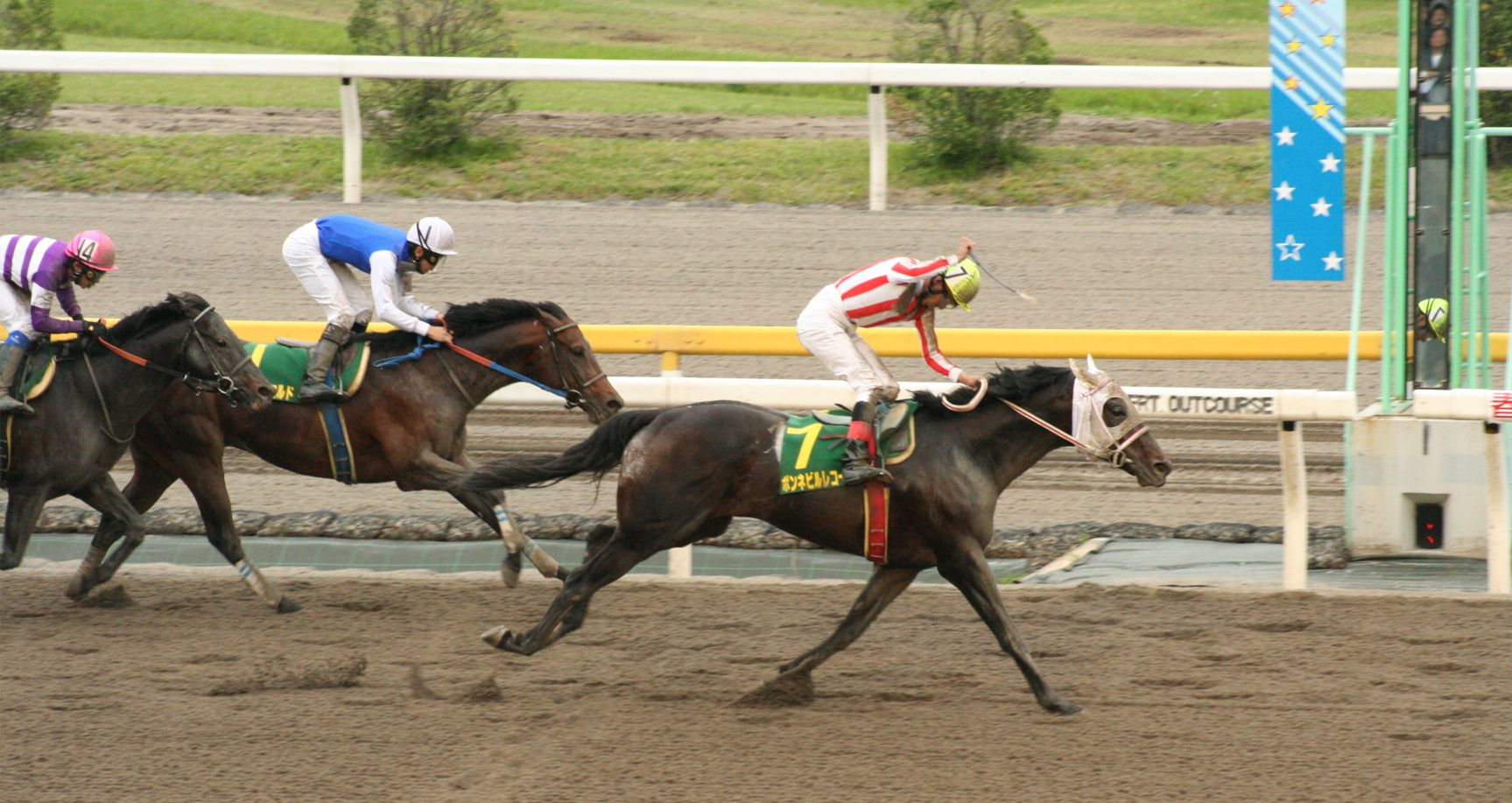 第20回かしわ記念（勝馬: ボンネビルレコード 2008年5月5日 船橋競馬場）